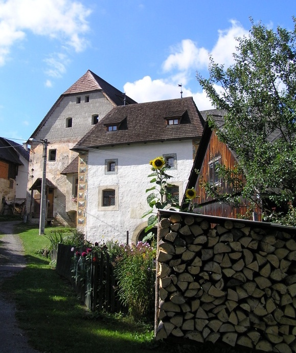 Drslavická tvrz nedaleko Prachatic